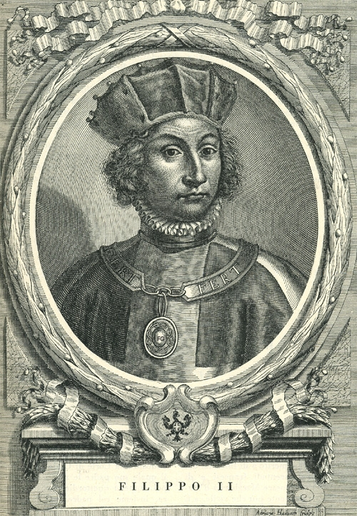 Filippo II di Savoia (–1497)